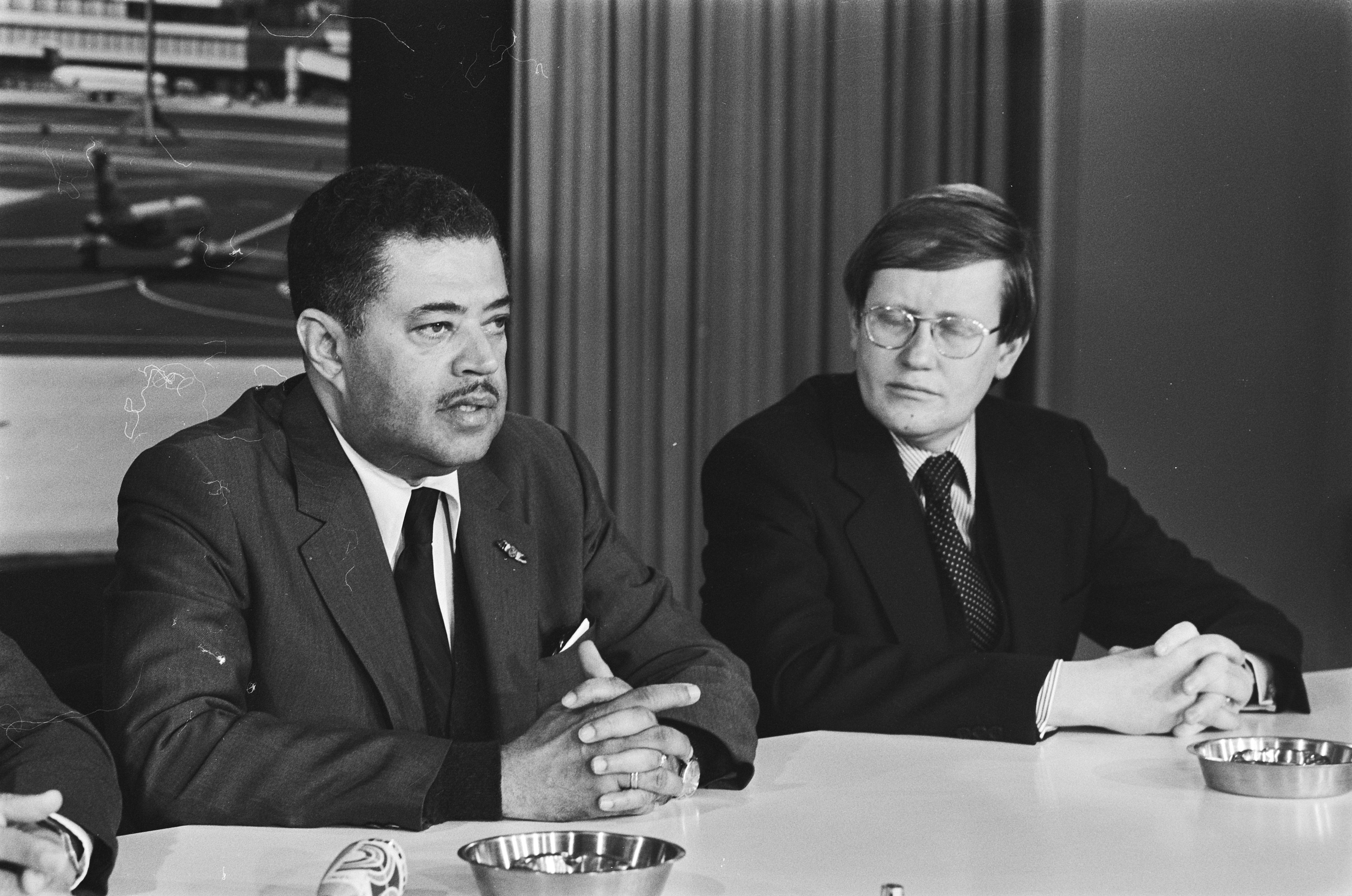 Minister Wiegel haalt premier Nederlandse Antillen Rozendal van Schiphol; tijdens persconferentie